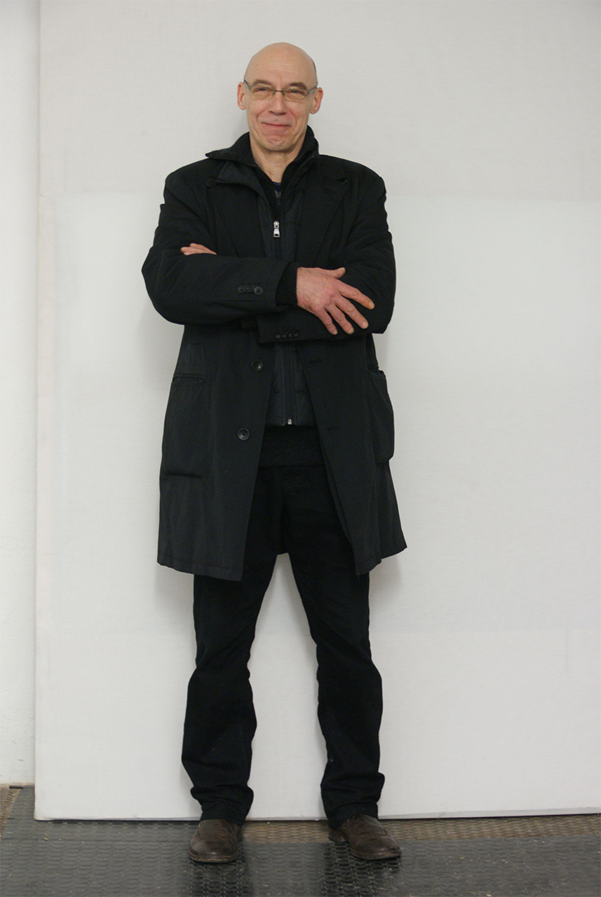 ter Hell beim Aufbau der Ausstellung 'Synekdoche', Berlin 2013